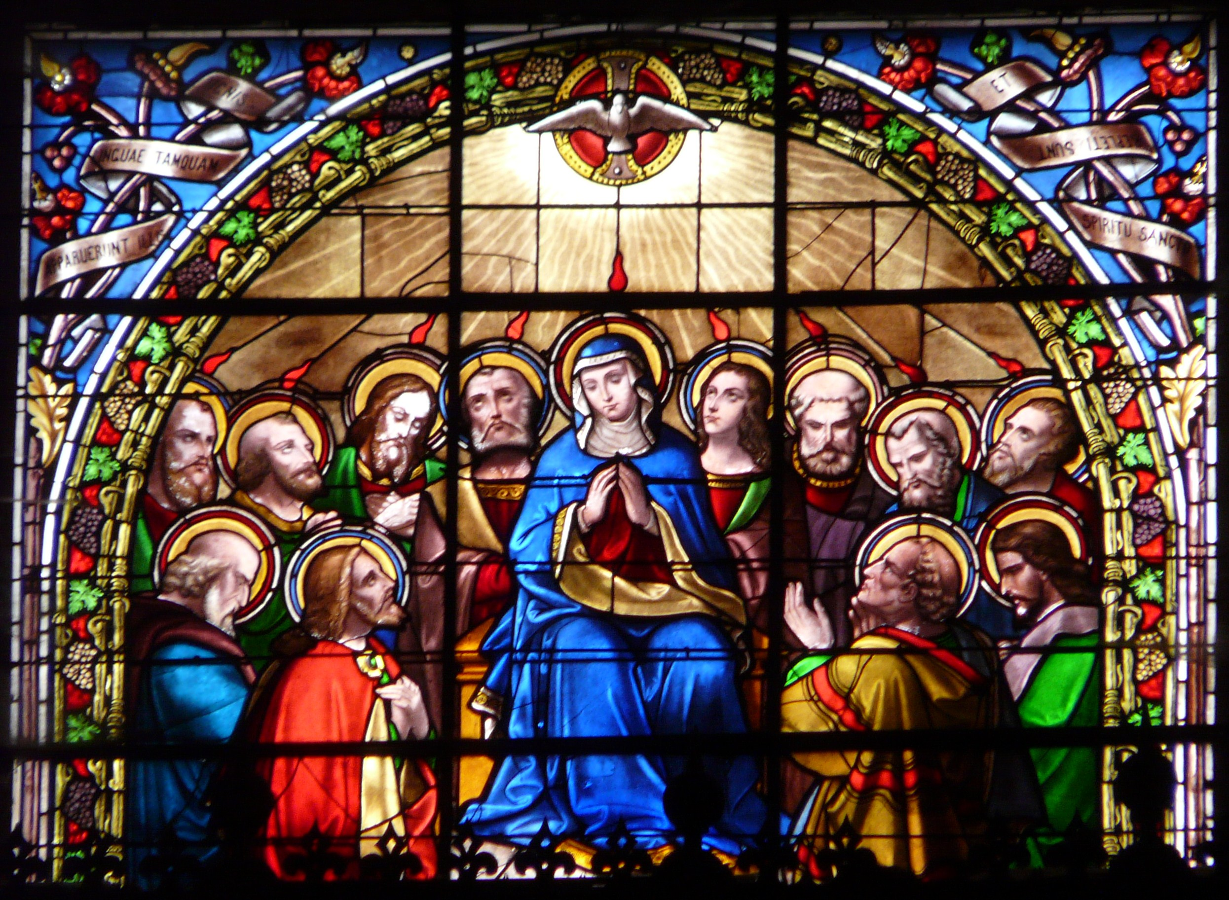 Représentation de la Pentecôte, œuvre de Joseph Villiet, vitrail de la tribune, église Saint-Nicolas, Nérac, Lot-et-Garonne, France.